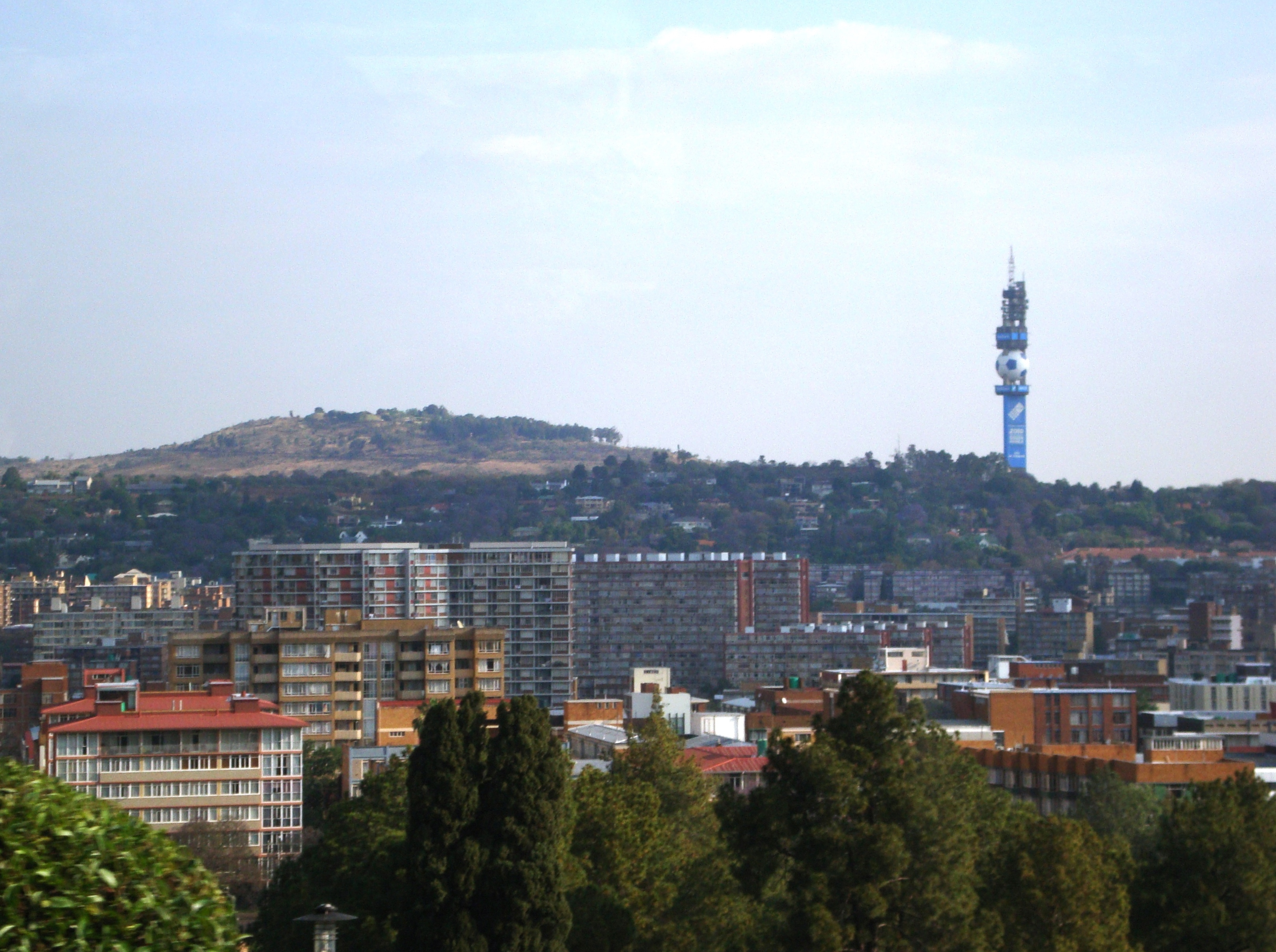 Pretoria, Africa de Sud